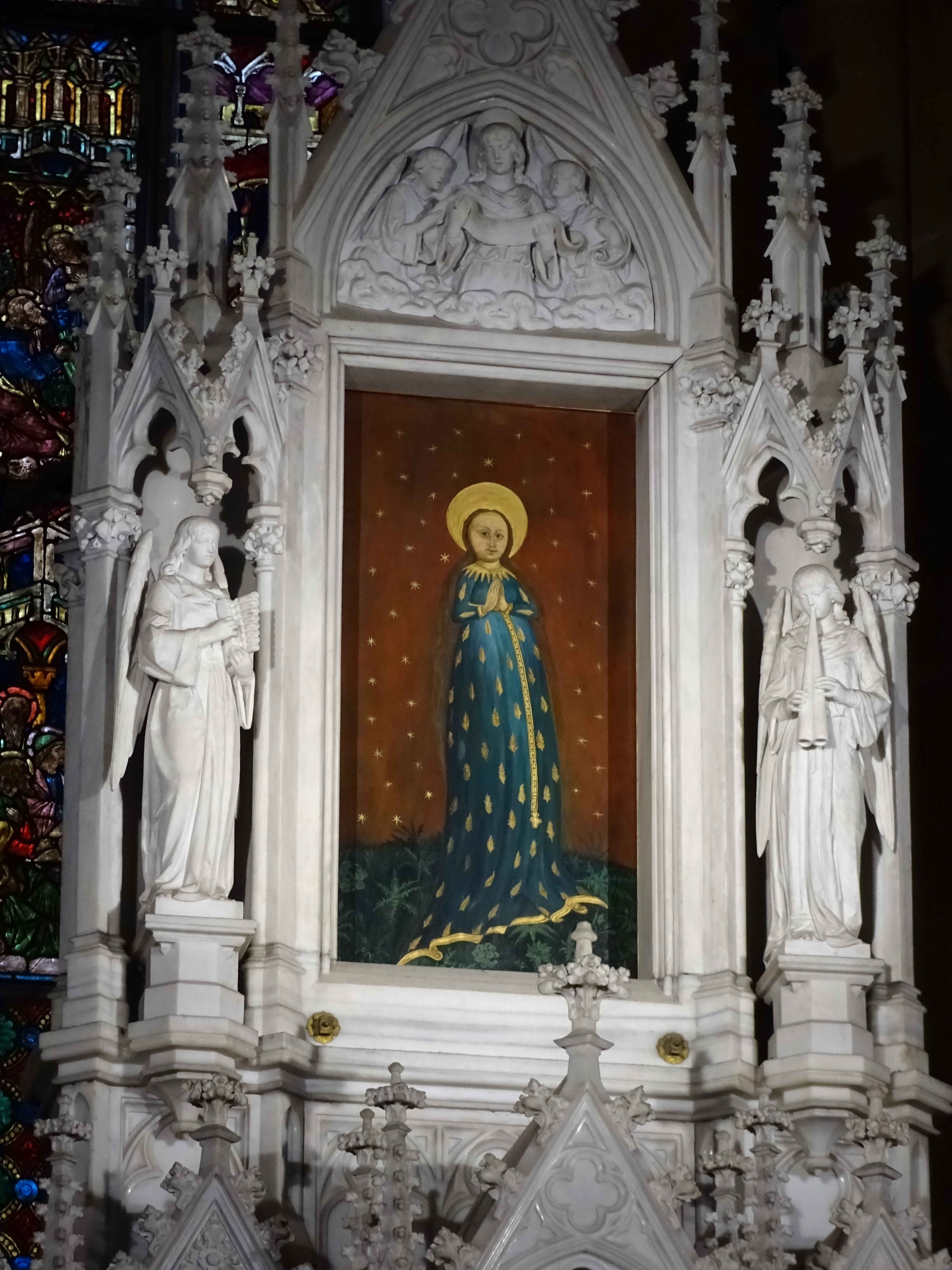 Das Bild der Ährenkleidmadonna auf dem Hochaltar der Wallfahrtskirche Maria Straßengel. Das Original eines steirischen Meisters stammte aus dem Jahr 1430 und wurde 1976 gestohlen. Das heutige Bild ist eine moderne Kopie aus dem Jahr 1978.